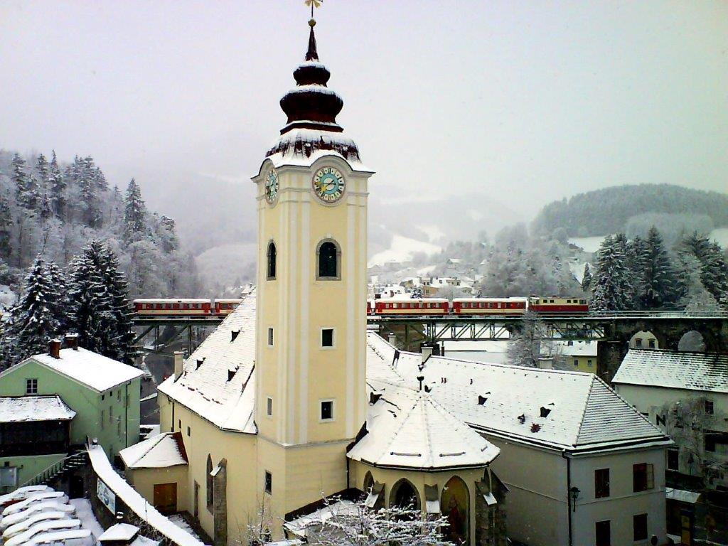 3340 Waidhofen an der Ybbs, Bürgerspitalkirche Hl. Katharina, Eberhard-Platz Dieses Bild wurde anlässlich des österreichischen Tags des Denkmals 2016 in Niederösterreich eingereicht.